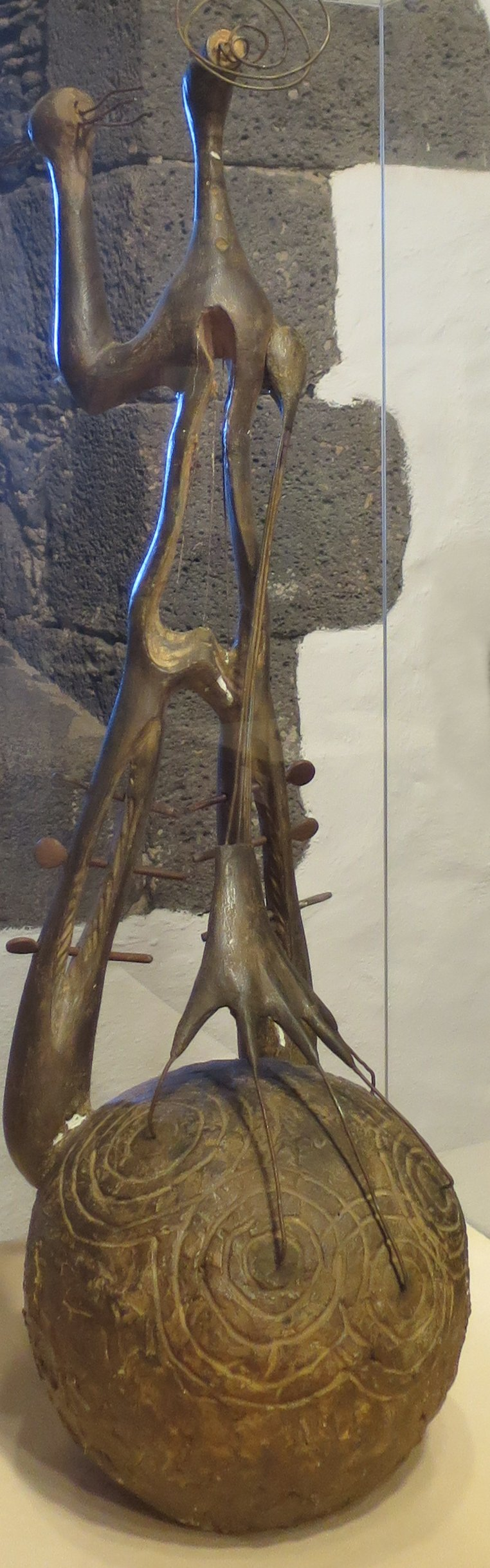 Pancho Lasso - Monumento a la International (a la Música), 1933-34, Castillo de San José